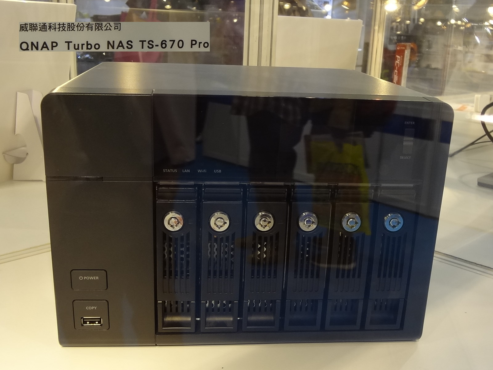 2013年資訊月百大創新產品：威聯通科技Turbo NAS TS-670 Pro。